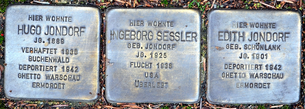 Braunschweig: Stolpersteine für drei Mitglieder der Familie Jondorf vor dem ehemaligen Judenhaus Hennebergstraße 7, in dem sie zuletzt leben mussten.